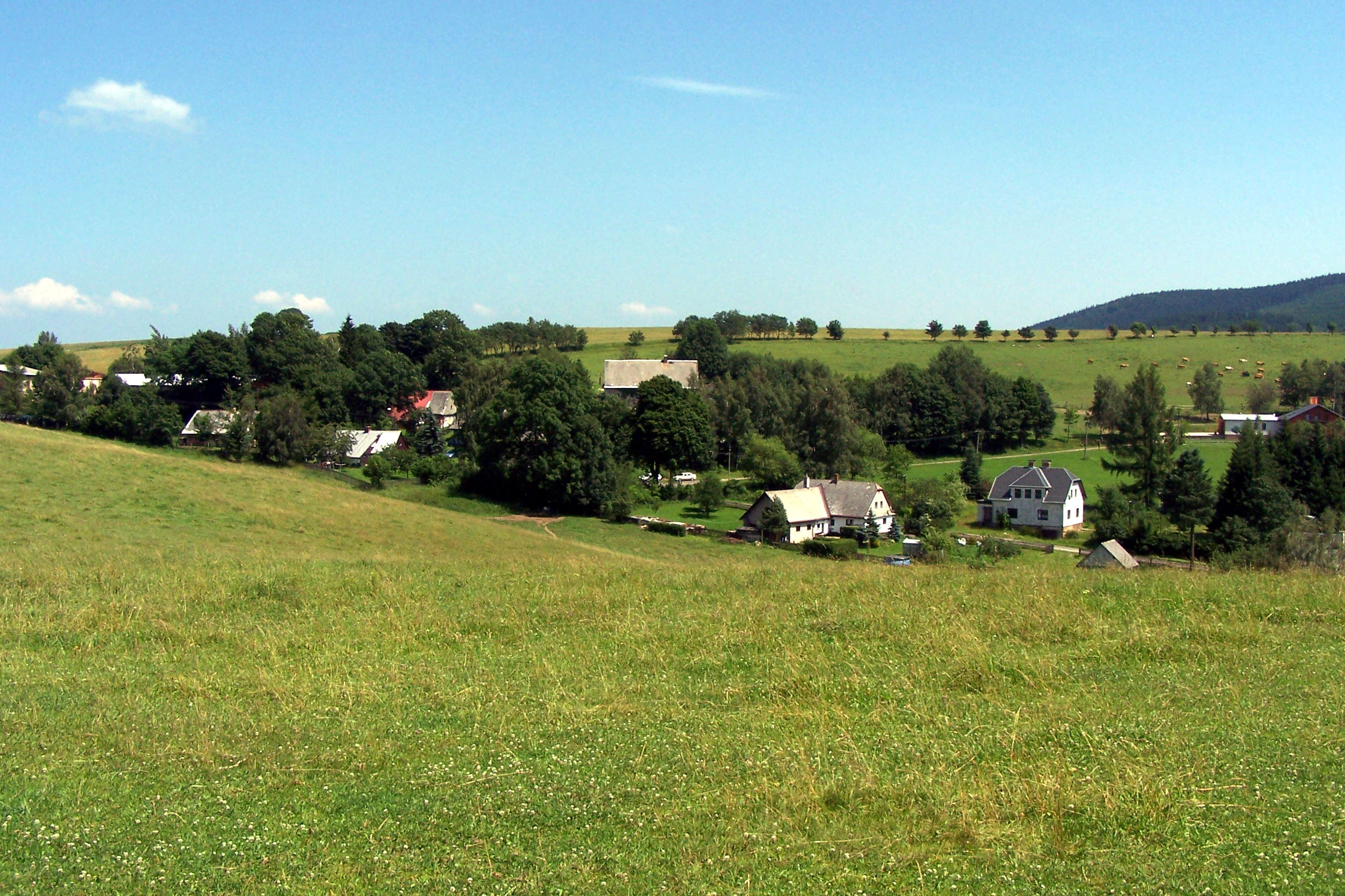 Dolní Hedeč - zachycená z Kopečku. GPS: 50.0752181N, 16.7883781E